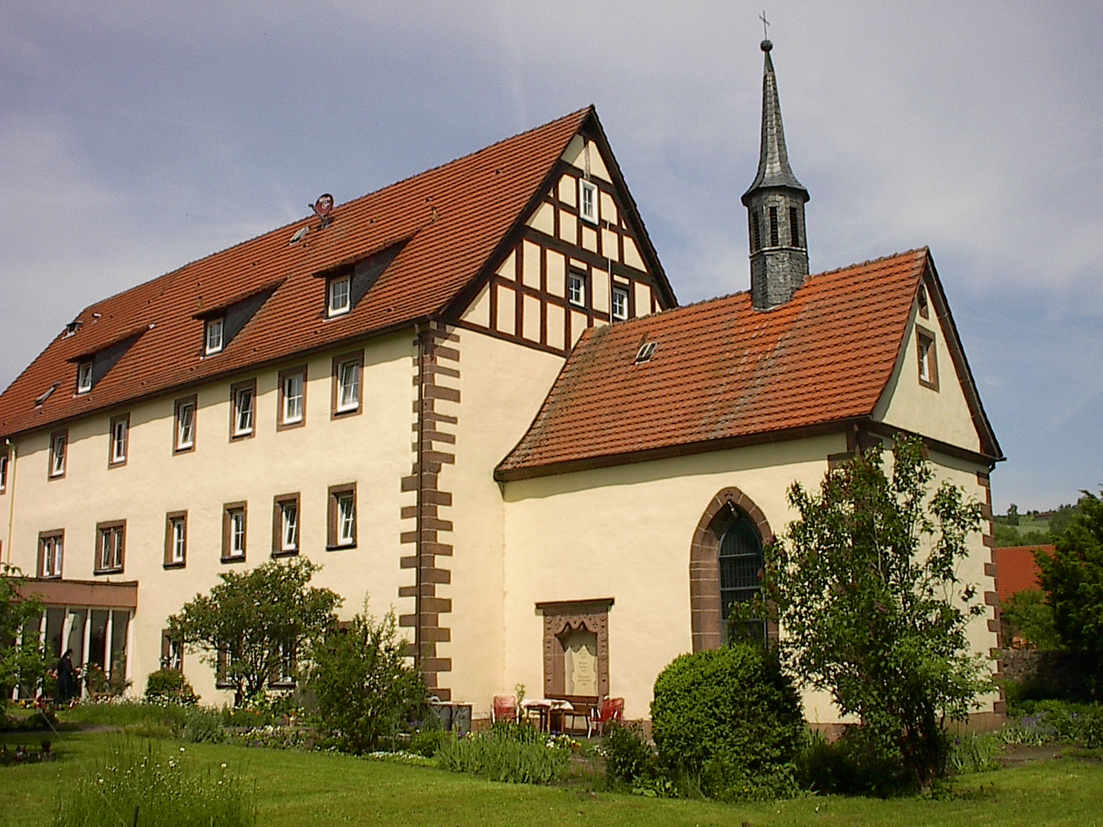 Ehem. Hospital des Klosters